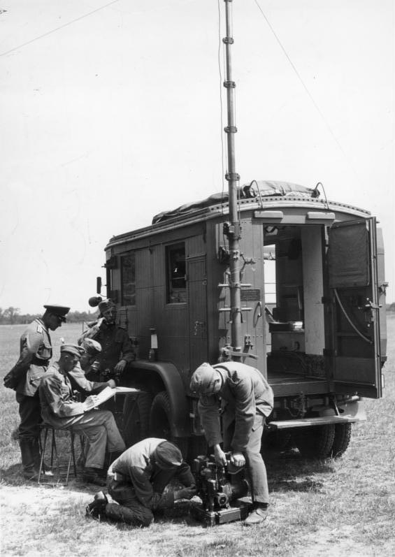 Unsere Wehrmacht Bildbericht von einer Felddienstübung der Nachrichten-abtlg. Magdeburg am 9.7.1935. 23631-35